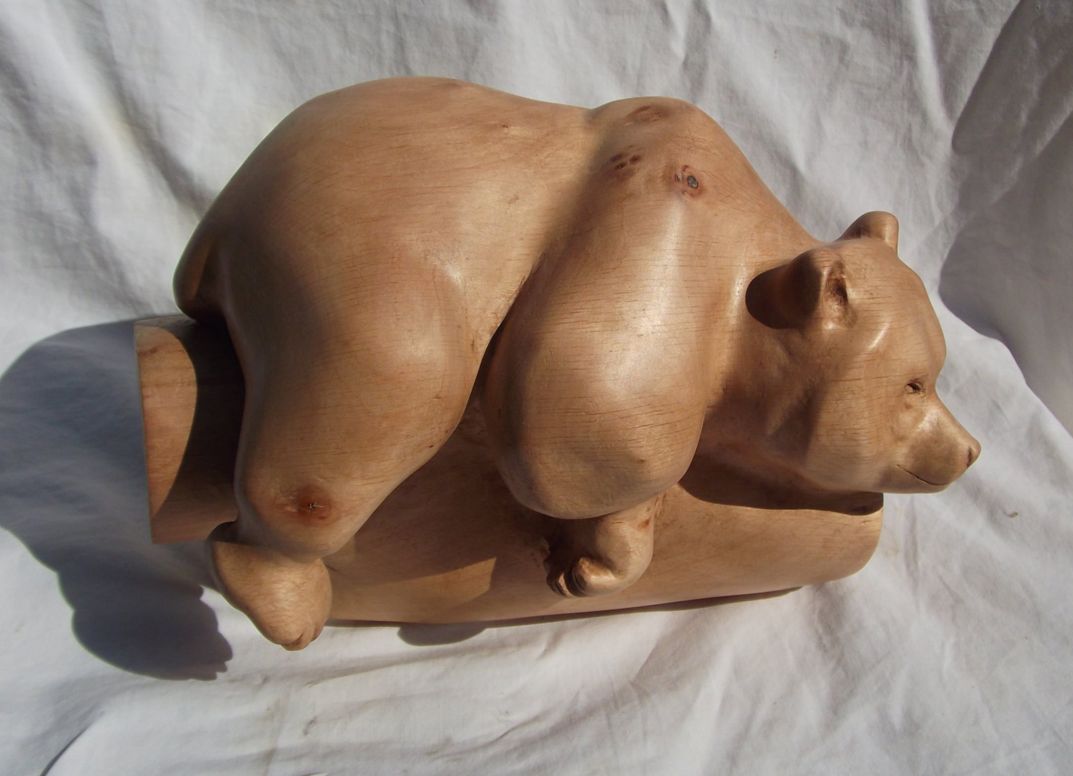 sculpture d'ours en aulne 2011